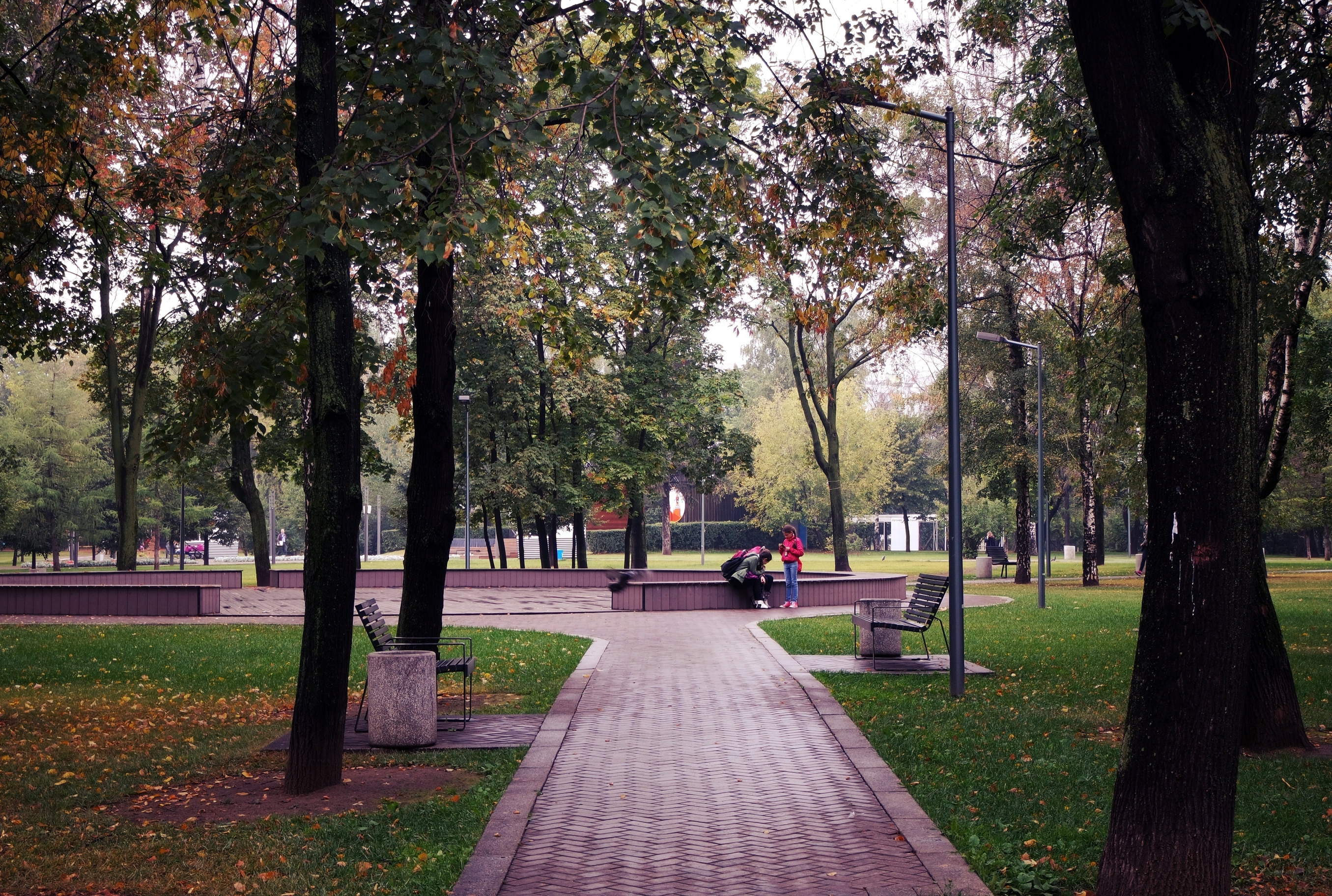 Парк на ул. Руставели (Гончаровский парк): Бутырский, Северо-Восточный округ, Москва